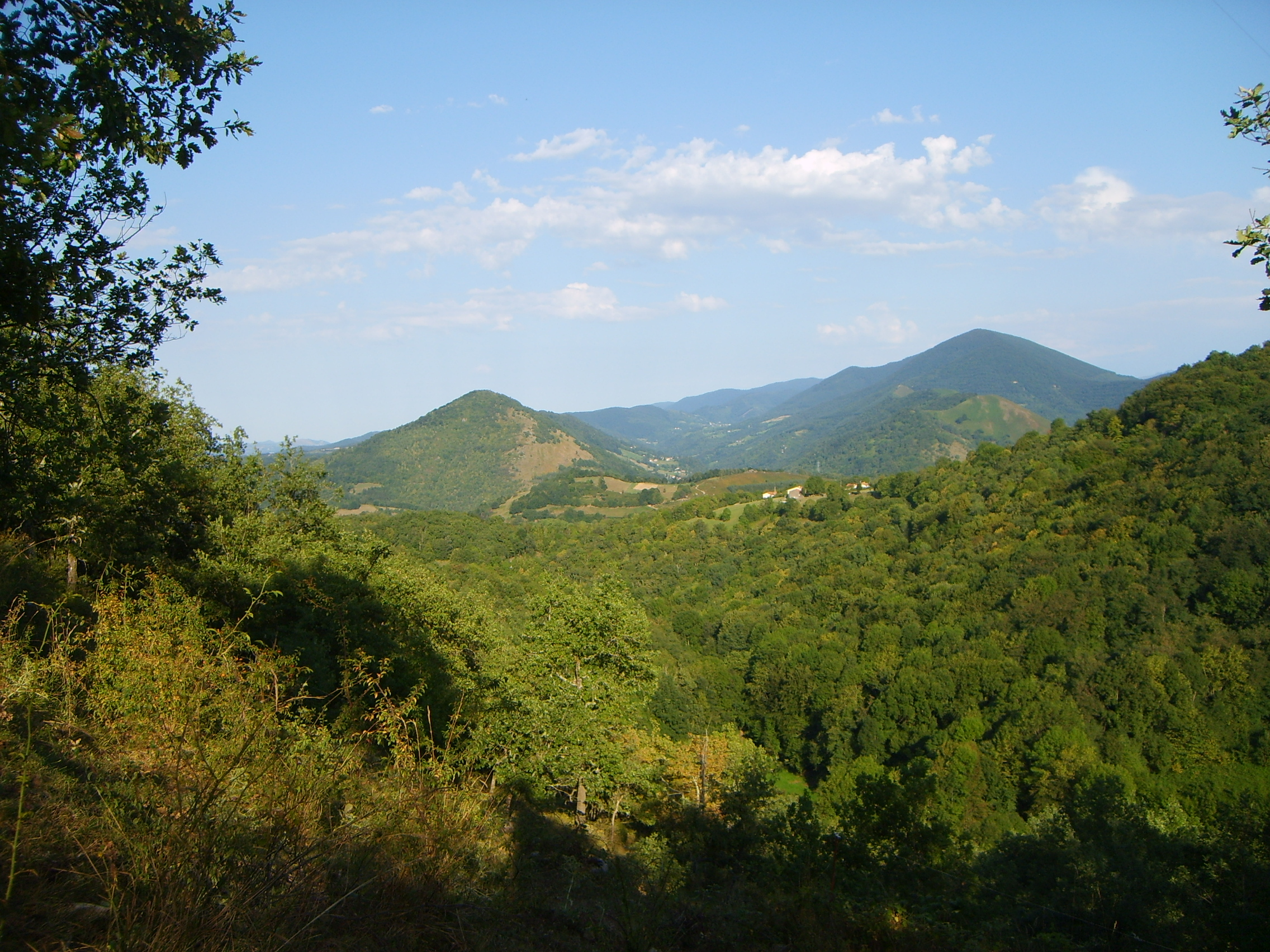 Saint-Girons (Ariège, France) : La vallée du Nert depuis le Sarrach.